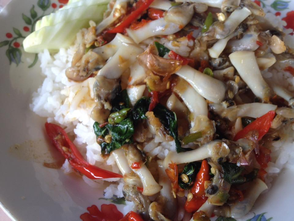 ผัดกระเพราหอยเสียบราดข้าว (Rice topped with stir-fried Knife jacked clam meat and basil)